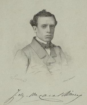 Portrait of José Maria do Casal Ribeiro (1825-1896), a Portuguese politician.